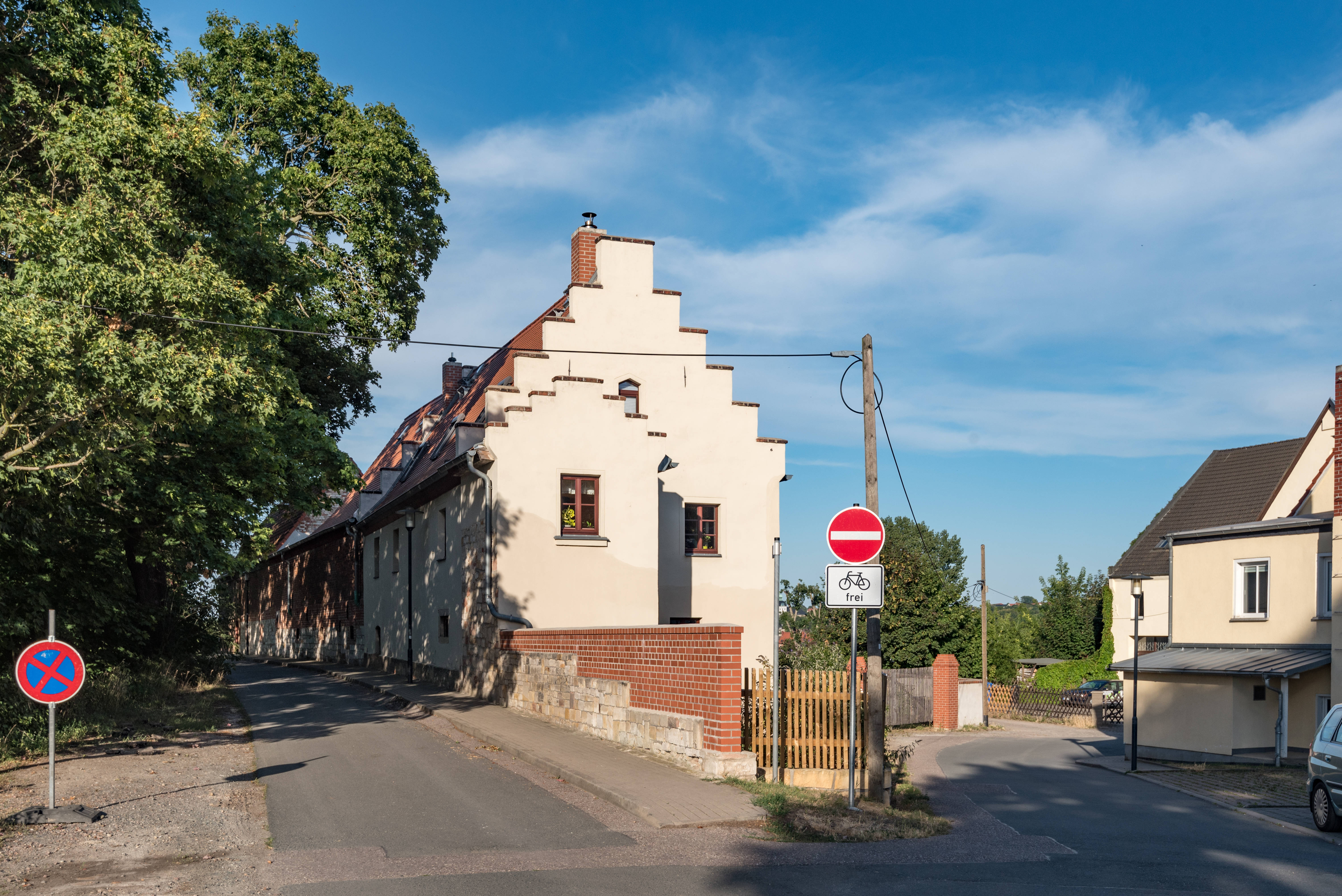 Weißenfels, An der Beude 6